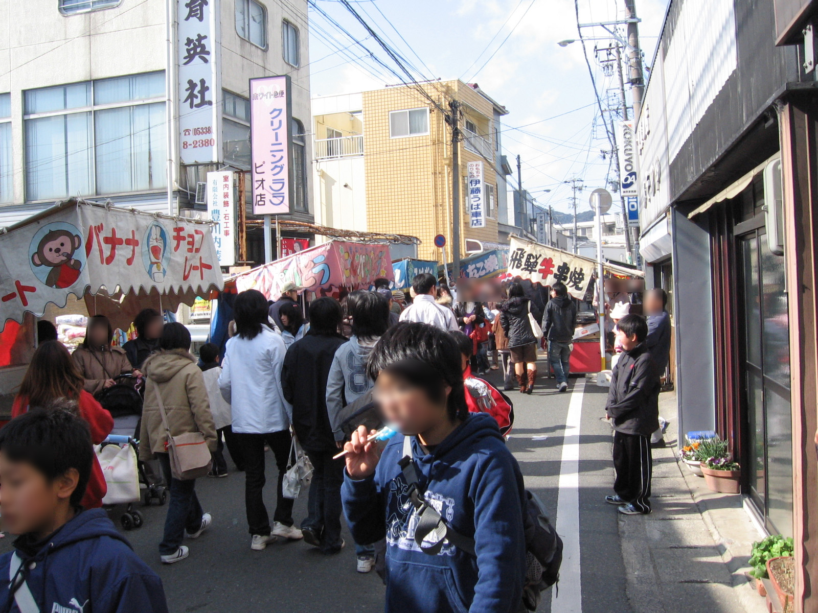 国府の市当日の賑わう国府商店街